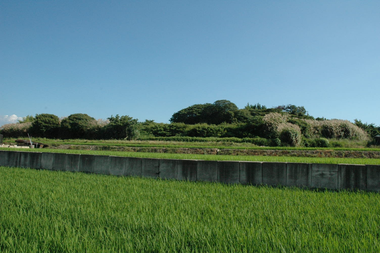 和泉黄金塚古墳（大阪府和泉市・国史跡）Izumikoganezuka Kofun, Izumi, Osaka, Japan